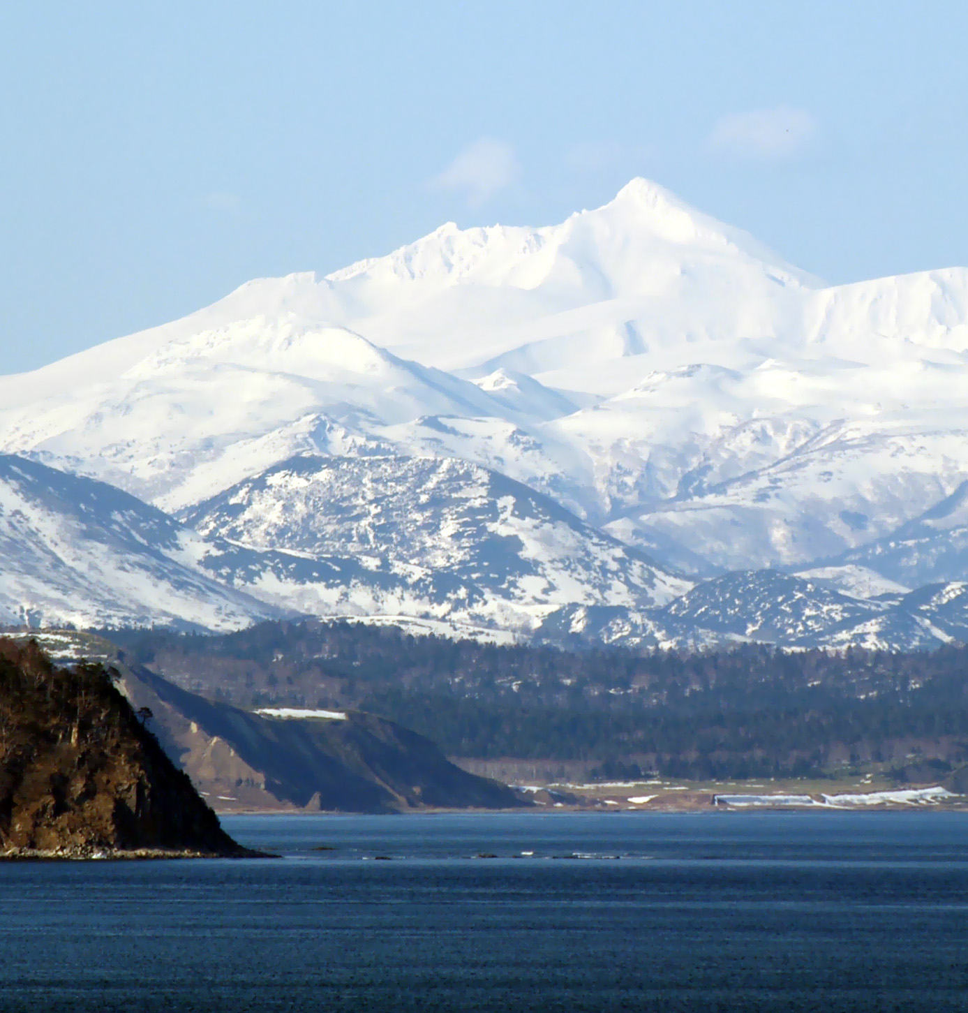 Вулкан Руруй, вид с п.г.т. Южно-Курильск